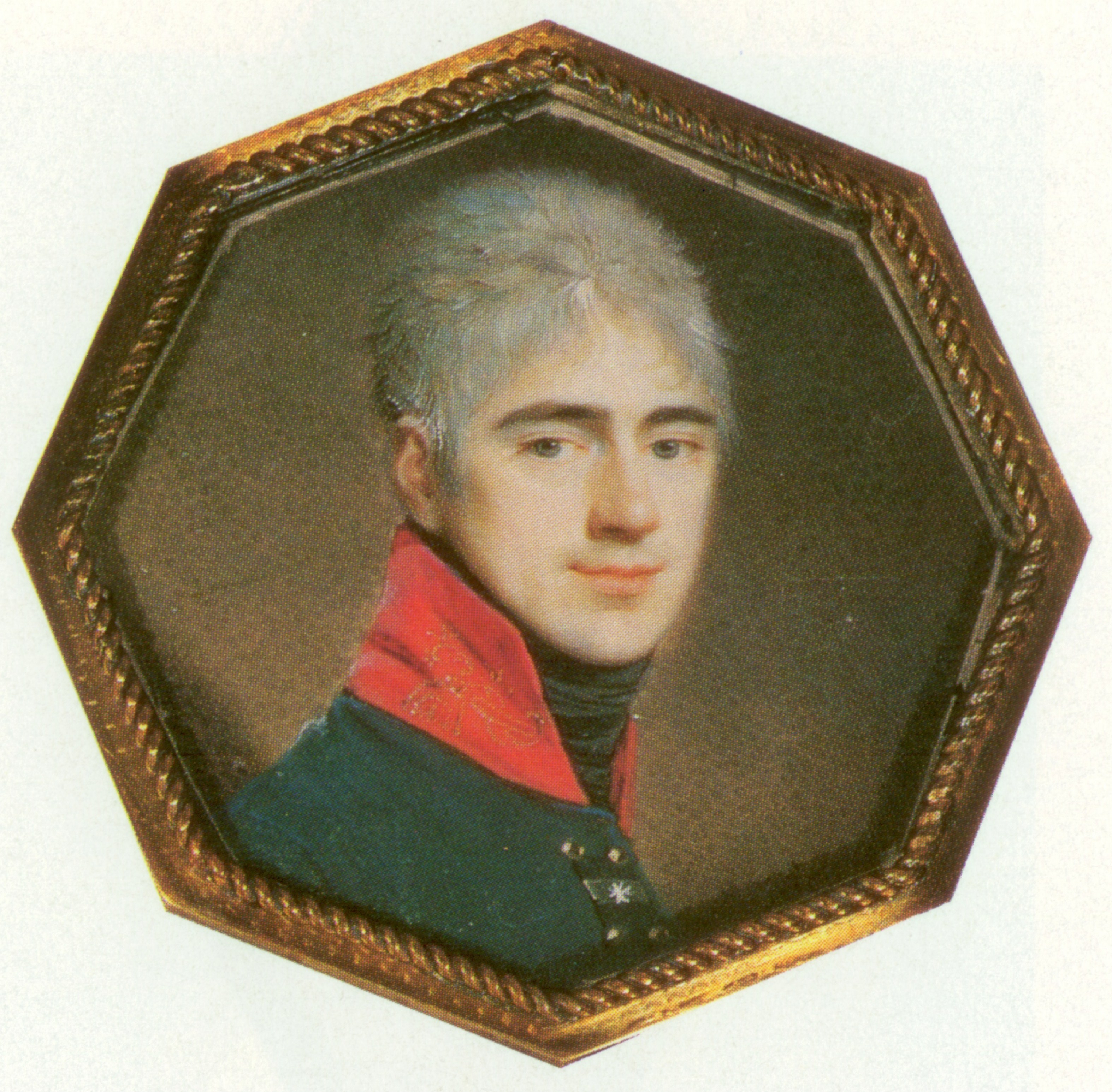 Петр Михайлович Волконский (1776-1852)